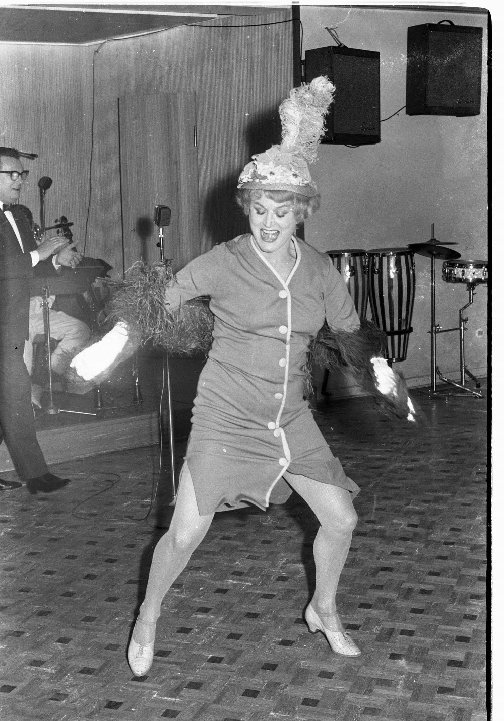 bei Bühnenschau im Tanz-Café Florida in der Dänischen Straße 12-16.